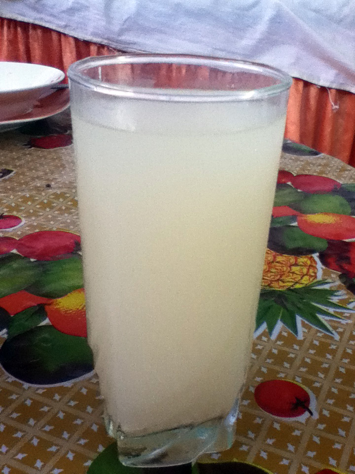 boa bebida caseira